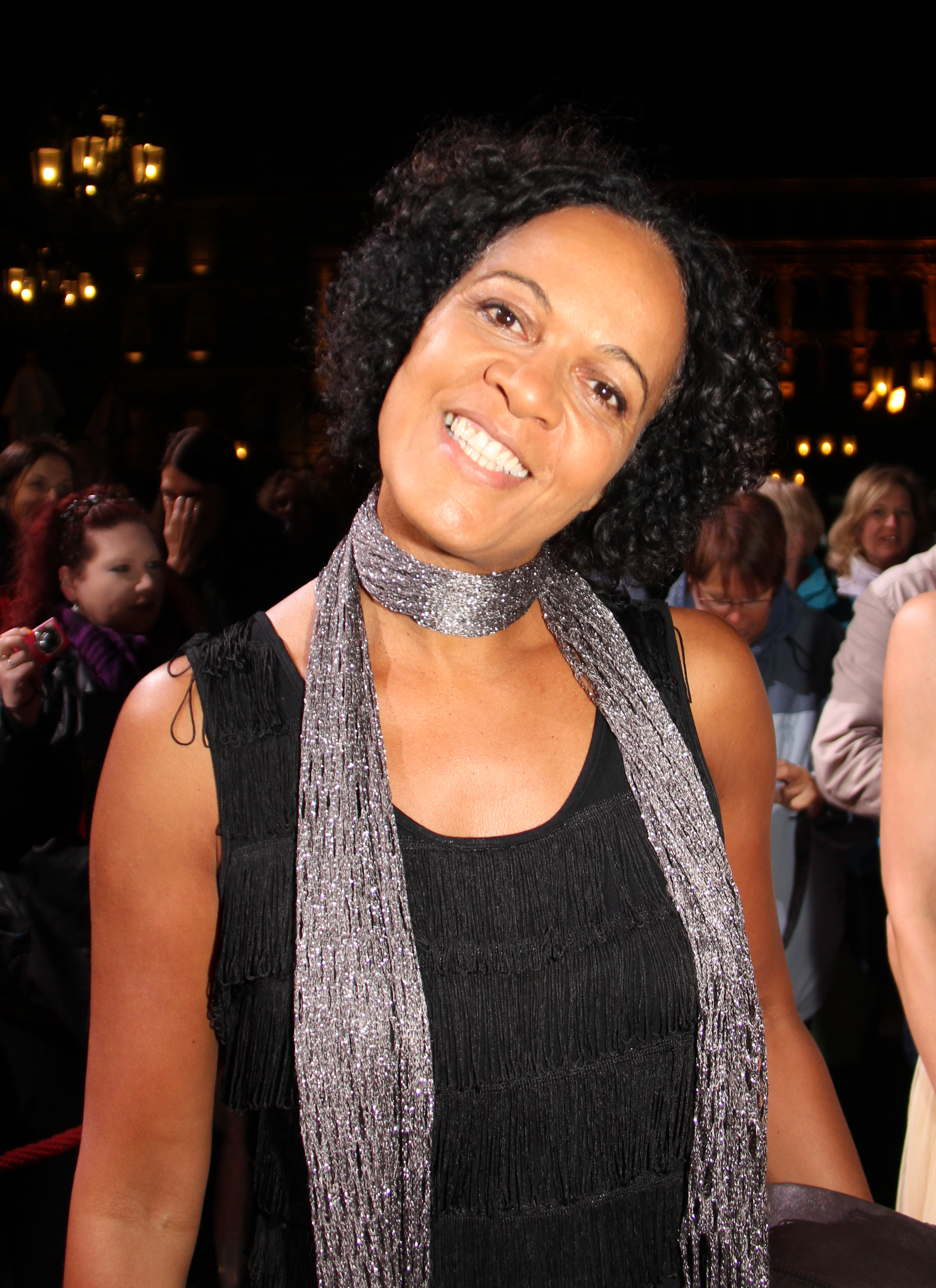 Mo Asumang beim Hessischen Film- und Kinopreis 2012